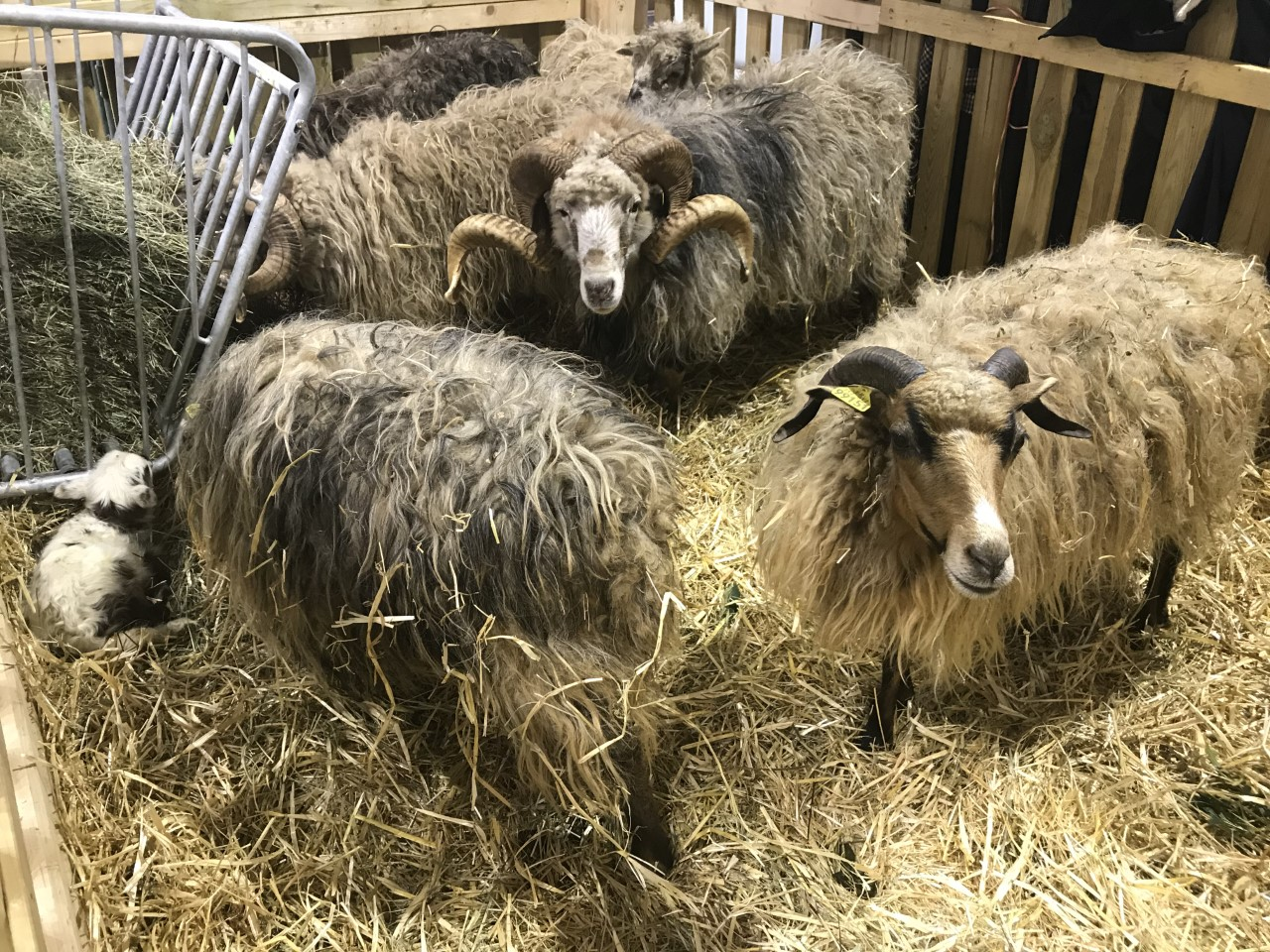 Chèvres corses au salon de l'agriculture 2020.